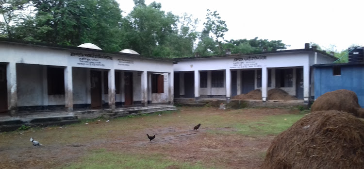 school